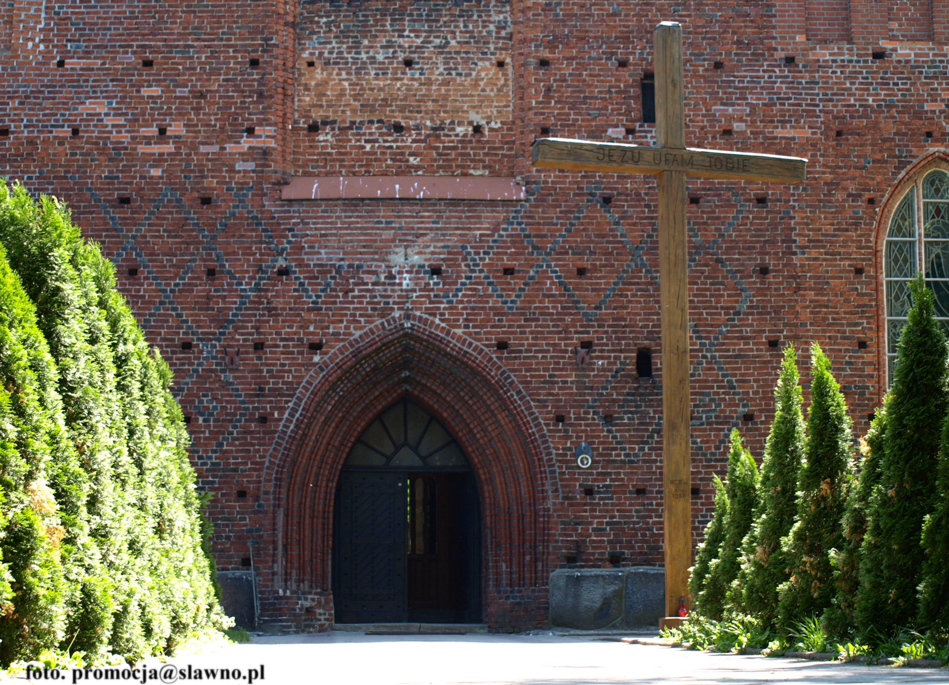 Portal wejściowy do Kościoła Wniebowzięcia Najświętszej Maryi Panny w Sławnie